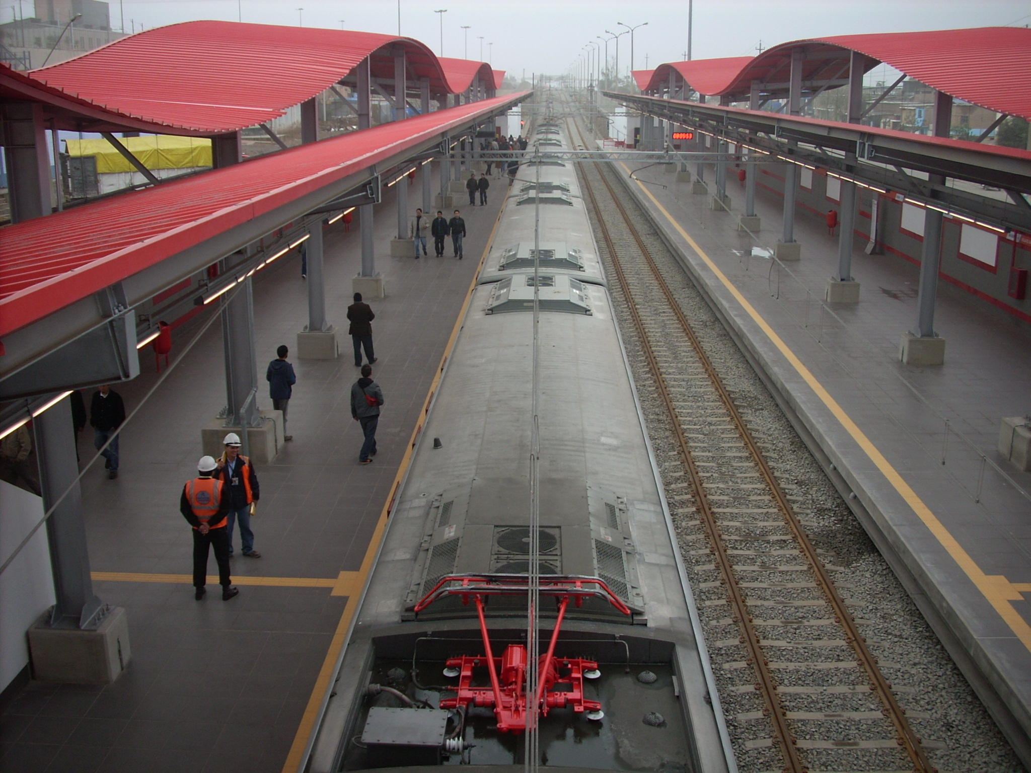 Estacion ubicada en la esquina de Av. Velasco y Separadora Industrial. Plataforma en de llegada del norte.